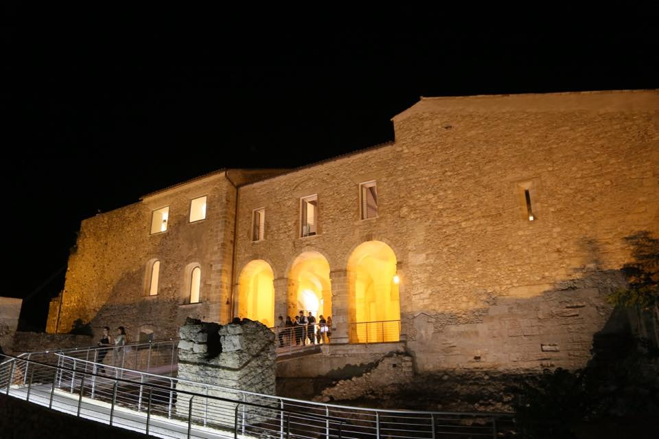 Veduta esterna del ristrutturato castello normanno-svevo di Cosenza